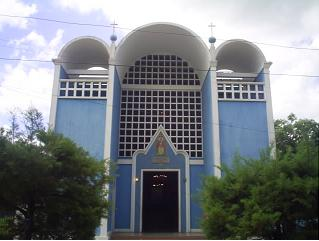 Iglesia de Cabure (Falcón, Venezuela)